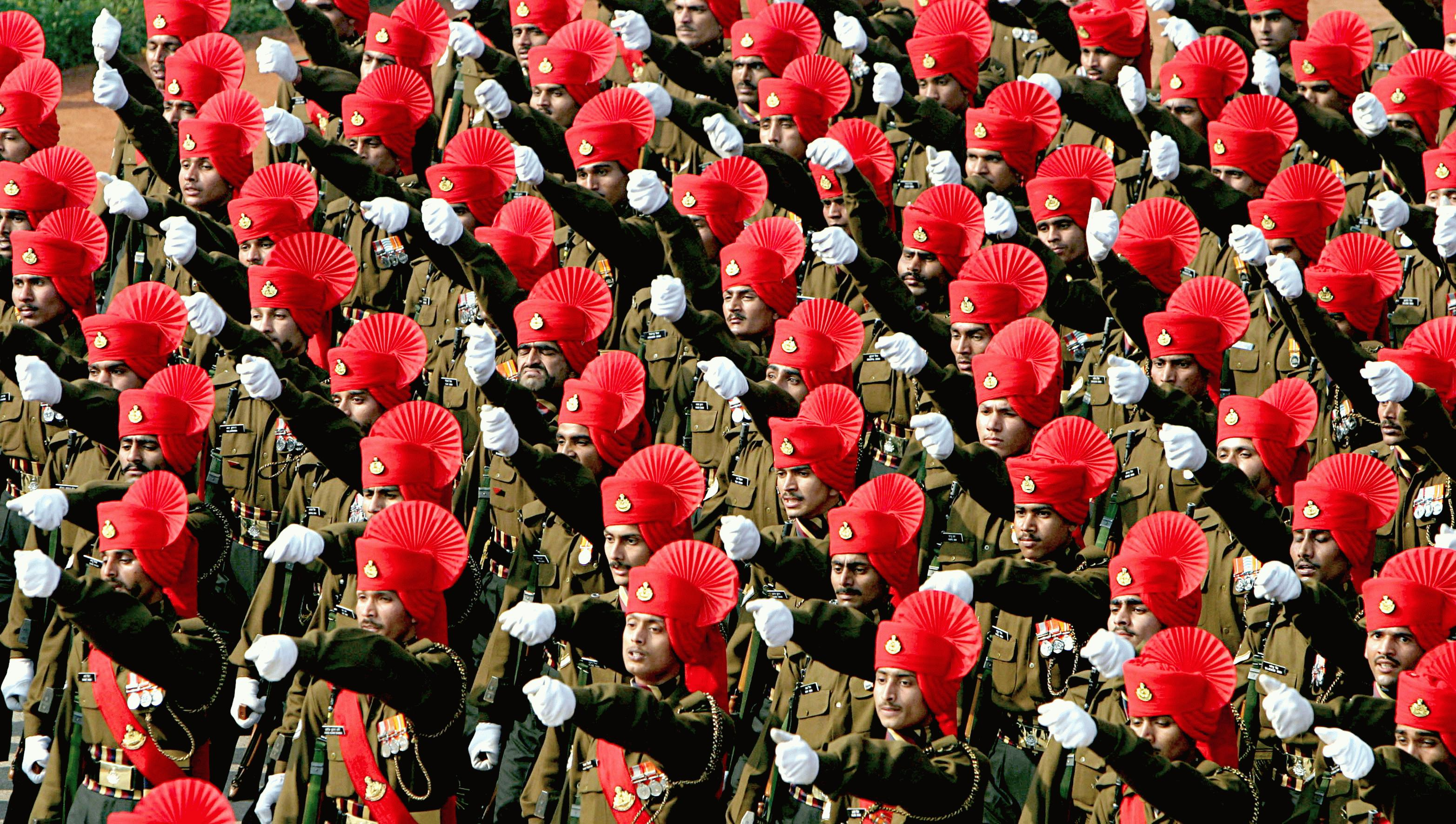 Nova Délhi (Índia) - Desfile do Dia da República indiana, na Rajpath.(foto:Antônio Milena)